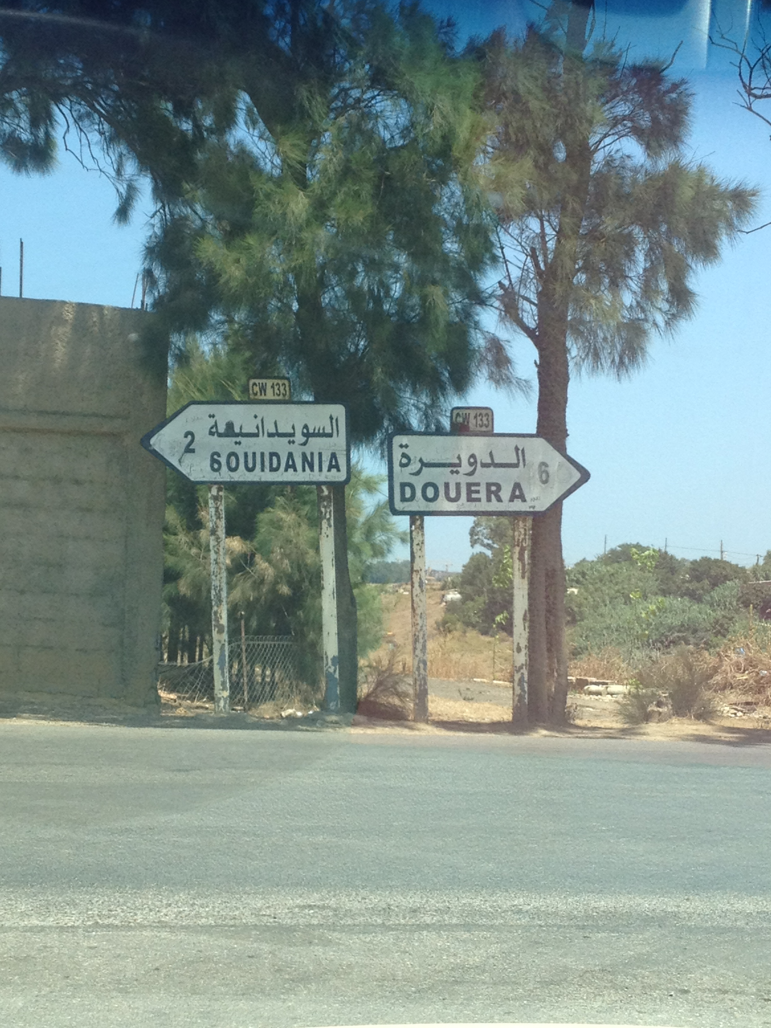 Intersection de Souidania, aller vers Souidania ville, ou aller vers Douera.